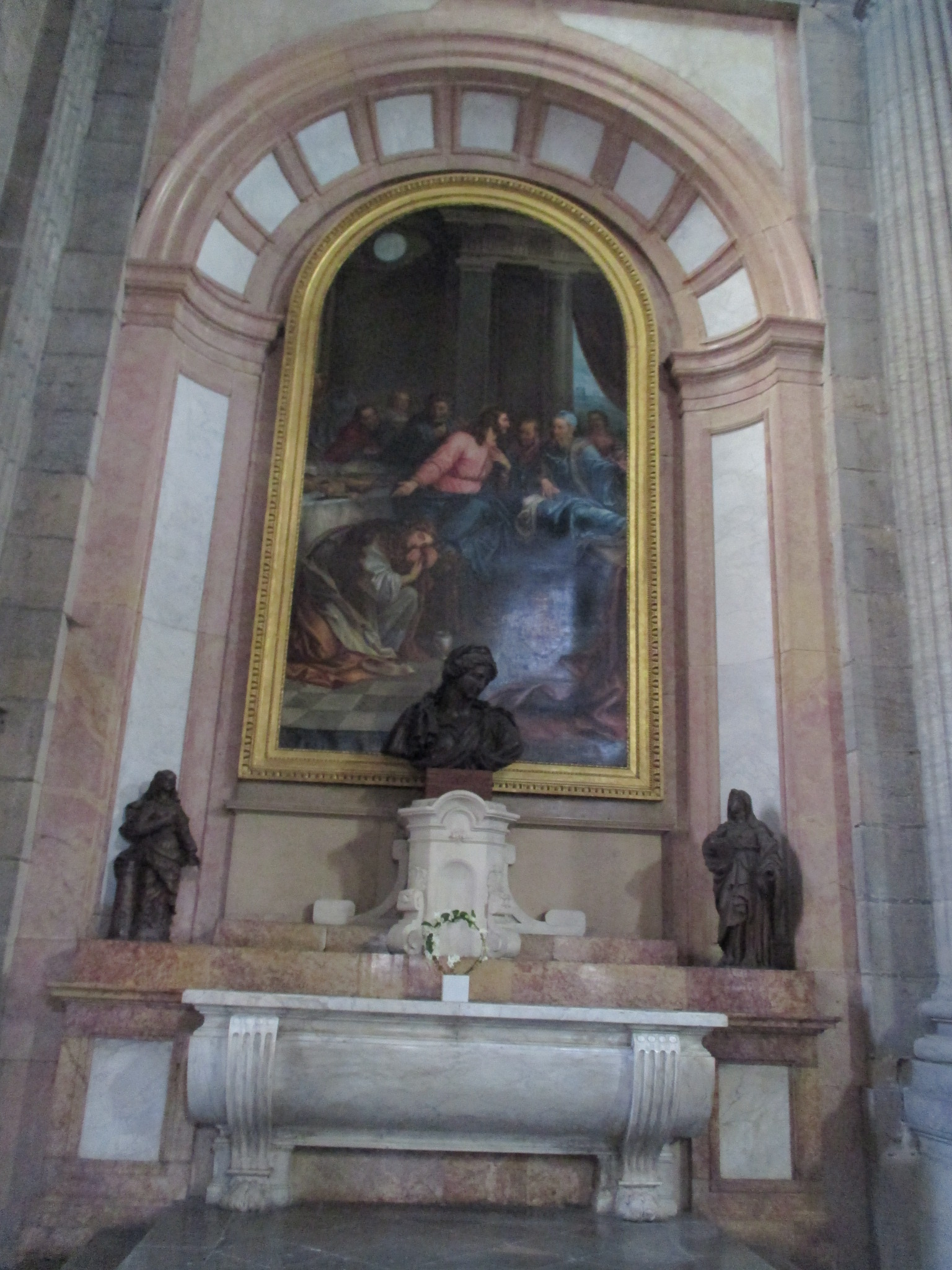 Église Sainte-Madeleine de Besançon